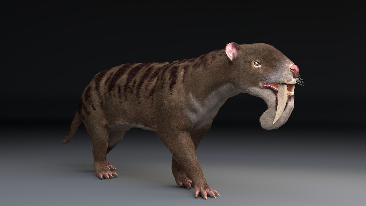 Modelo 3D realizado en Blender